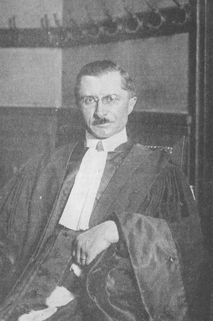 "M. Le Fur, dont la chaire a fait l'année dernière, au Quartier Latin, l'objet de graves contestations qu'on n'a pas oubliées, a inauguré son cours de Droit international à la Faculté de Droit de Paris".